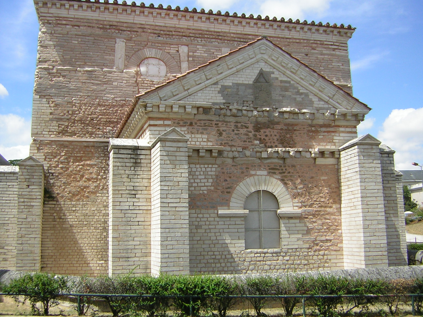 Poitiers: Baptistère Saint-Jean de Poitiers.